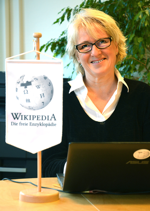 Die 1956 in Hannover geborene Lehrerin, Kommunalpolitikerin, Kriminalschriftstellerin, Sachbuchautorin und Herausgeberin Cornelia Kuhnert, hier während ihrer Anmeldung am 27. Januar 2016 im Wikipedia-Büro Hannover ...